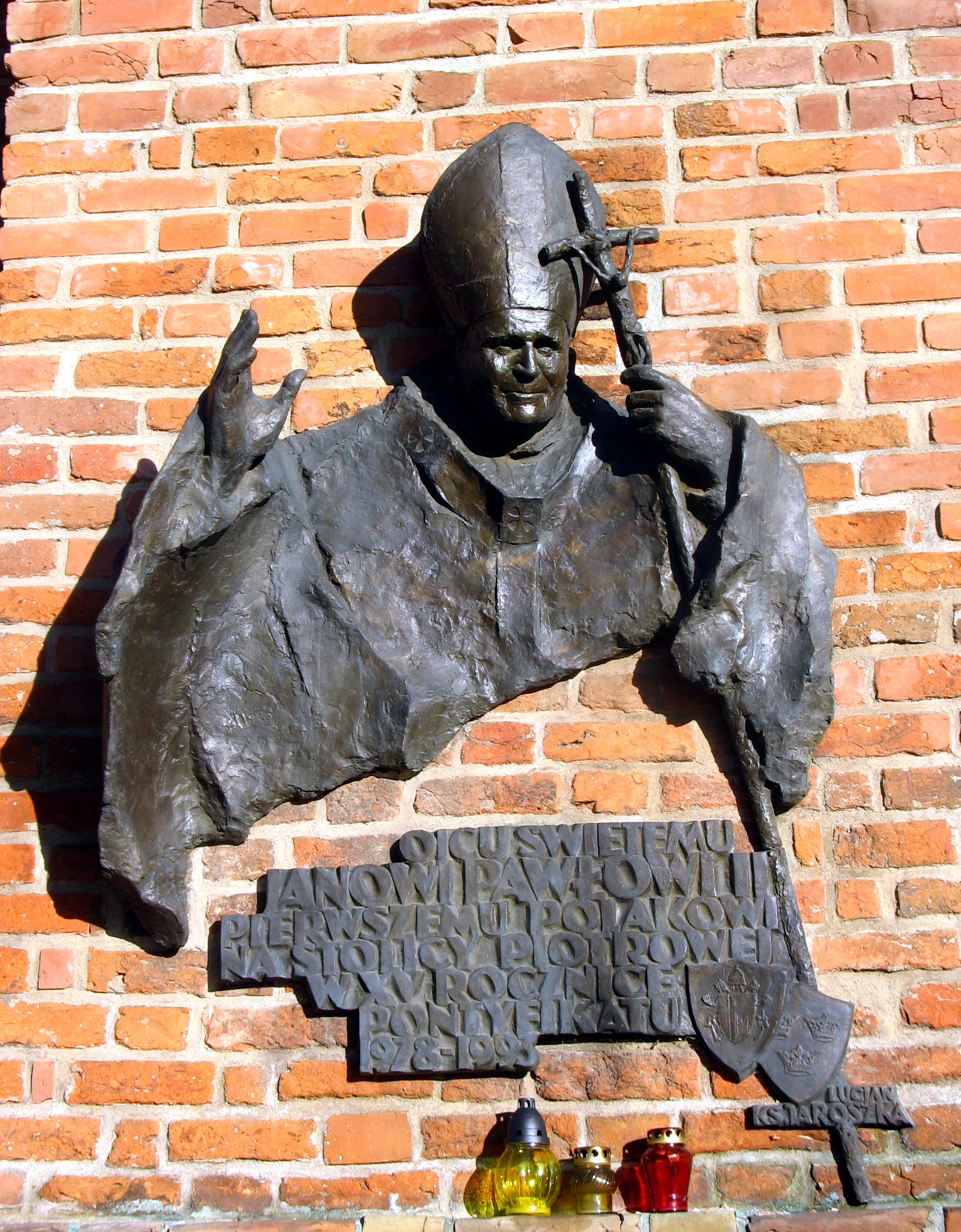 Płaskorzeźba Jana Pawła II na frontonie kościoła św. Mateusza w Pabianicach, ufundowana przez ks. Lucjana Jaroszkę w 15. rocznicę pontyfikatu papieża